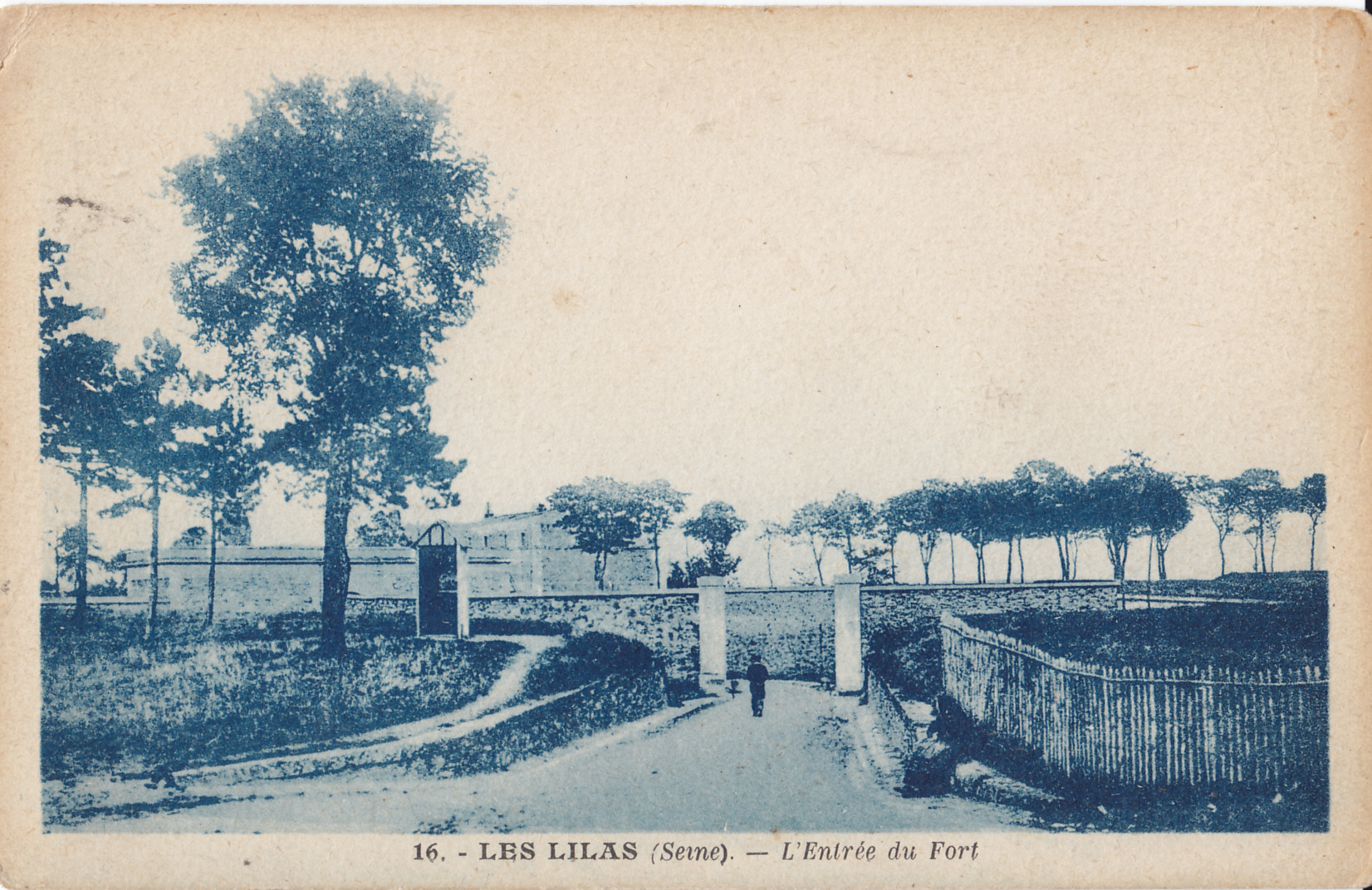 Carte postale ancienne éditée par Photo-éditions n°16 : LES LILAS - L'entrée du Fort